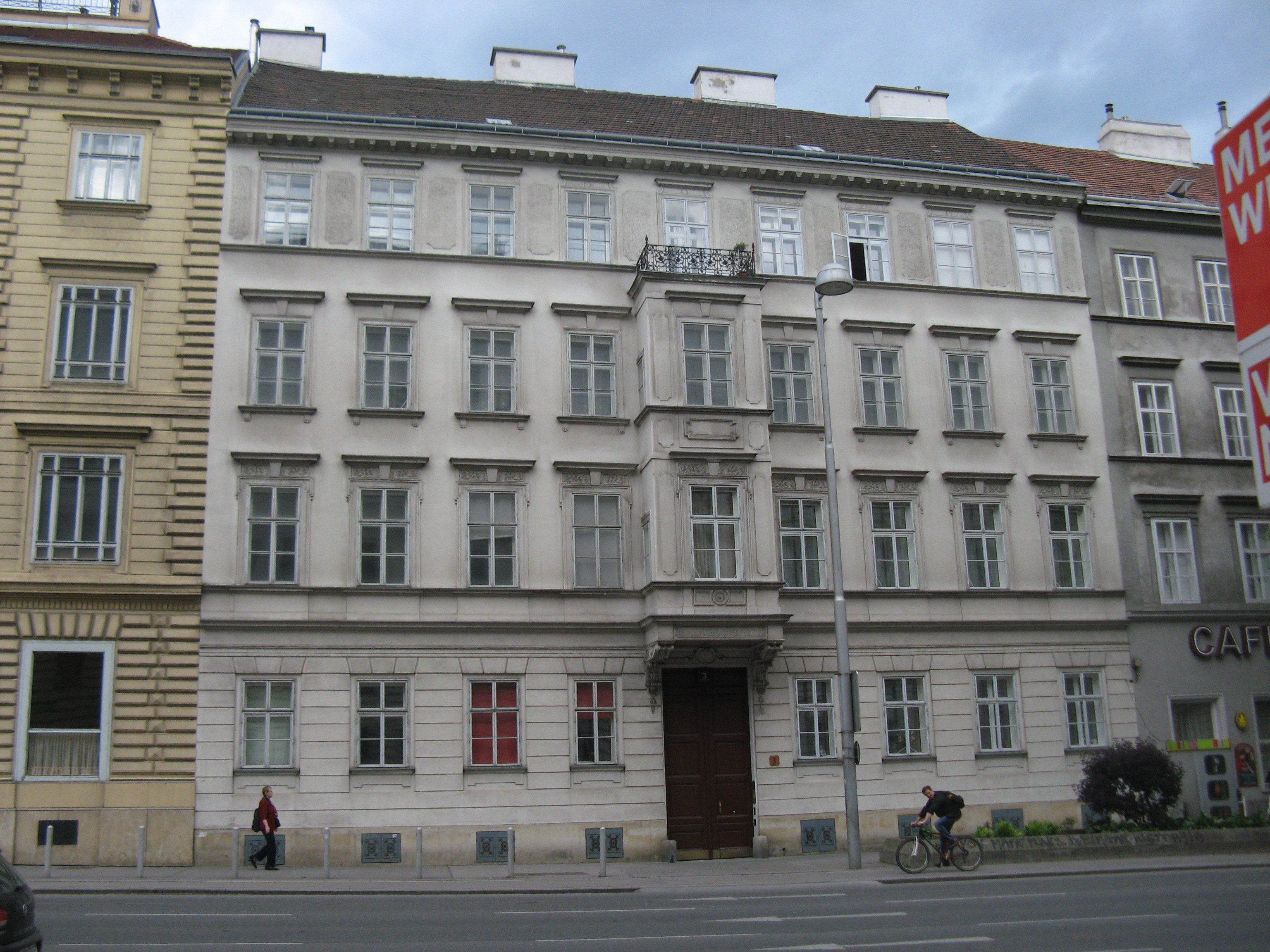 Haus (1839) von Franz Reymund, Landesgerichtsstraße 3, Wien-Josefstadt